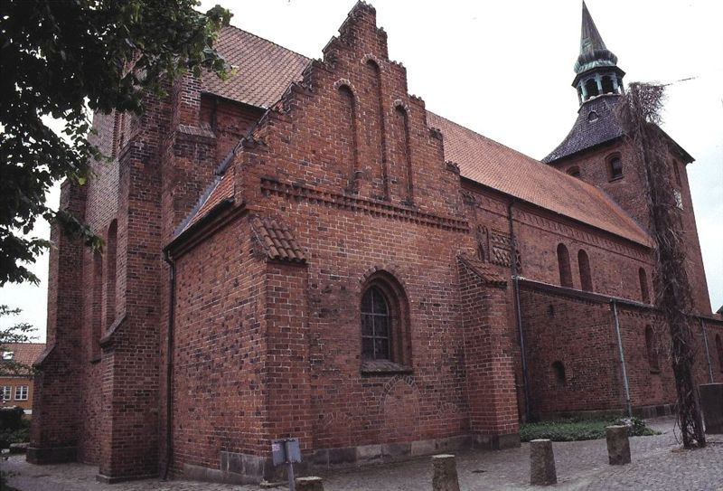 Sankt Nicolai Kirke (Svendborg Kommune)